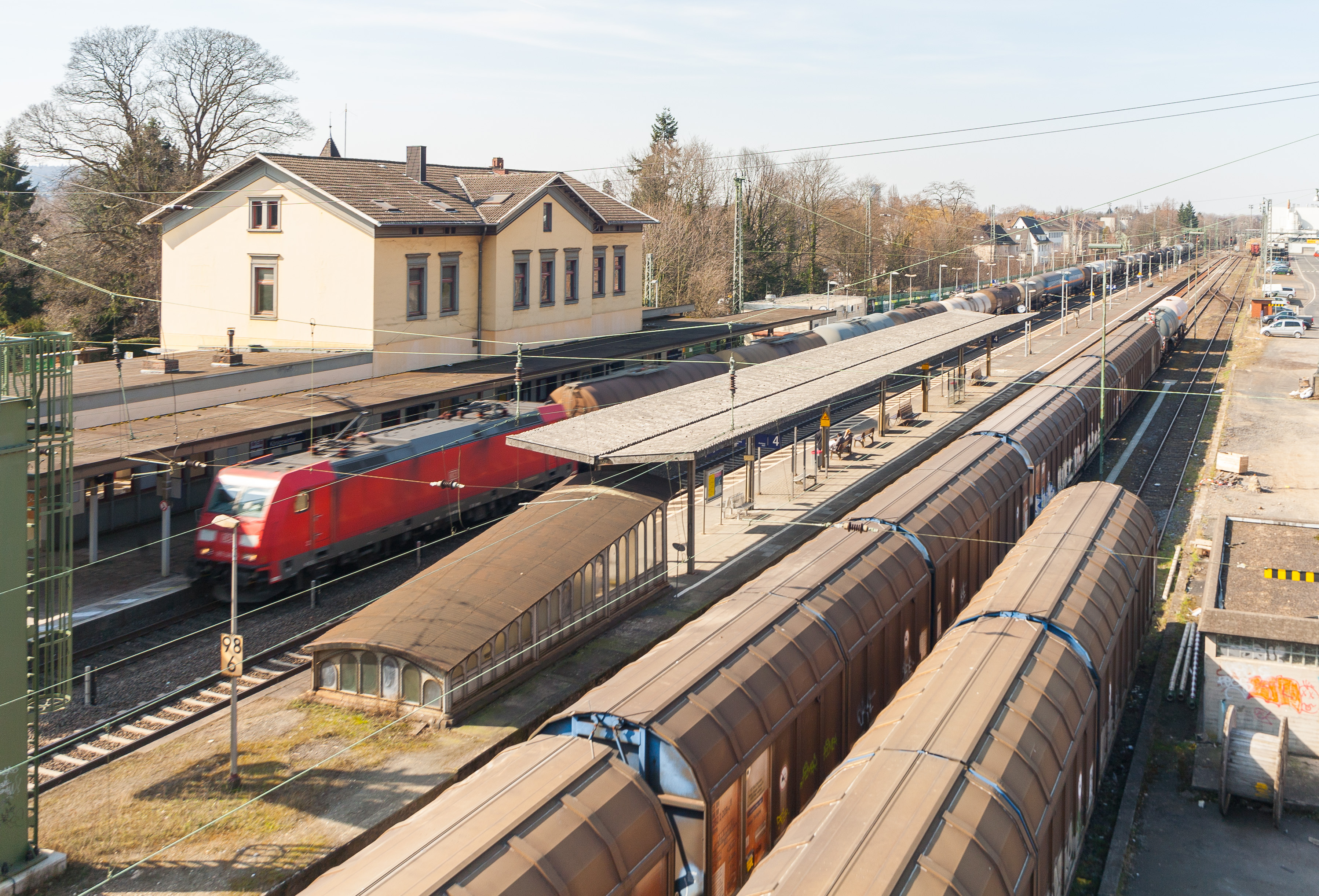 Bahnhof Königswinter: Gesamtübersicht von der Siebengebirgsbrücke